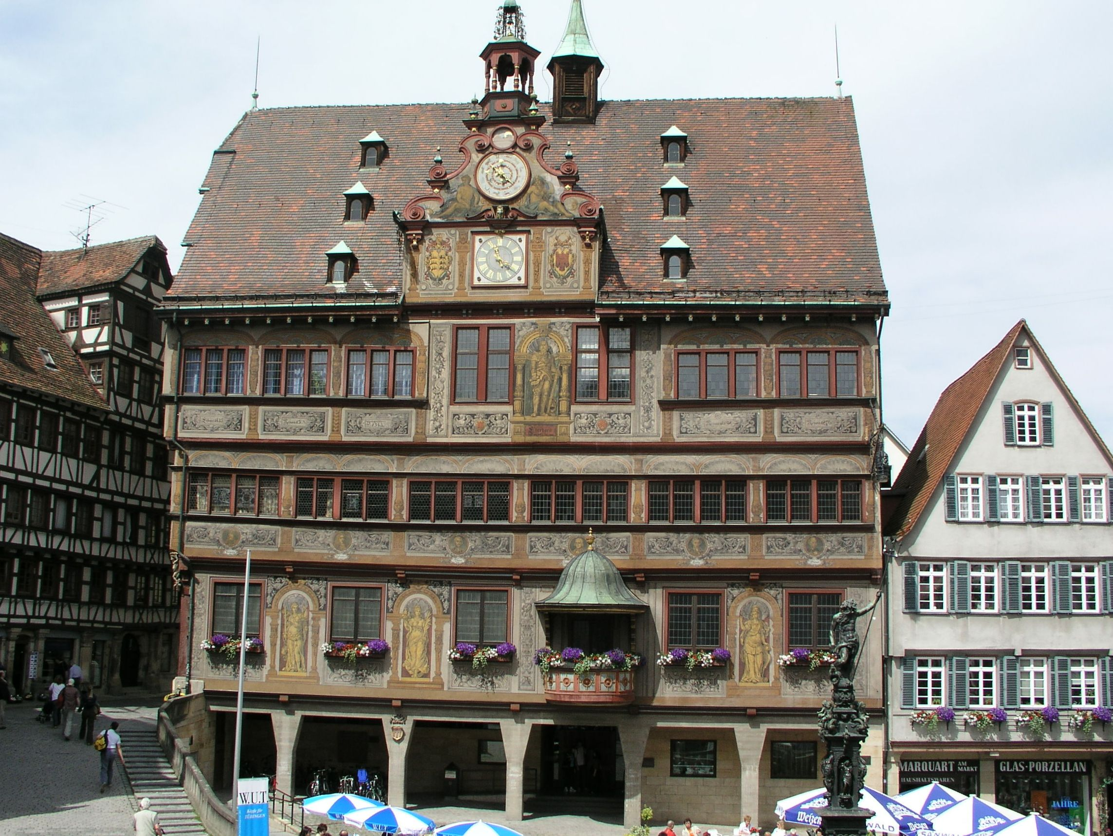 Das Tübinger Rathaus am Marktplatz. Foto von Otto Buchegger, Tübingen, 2004. Lizenz GNU FDL